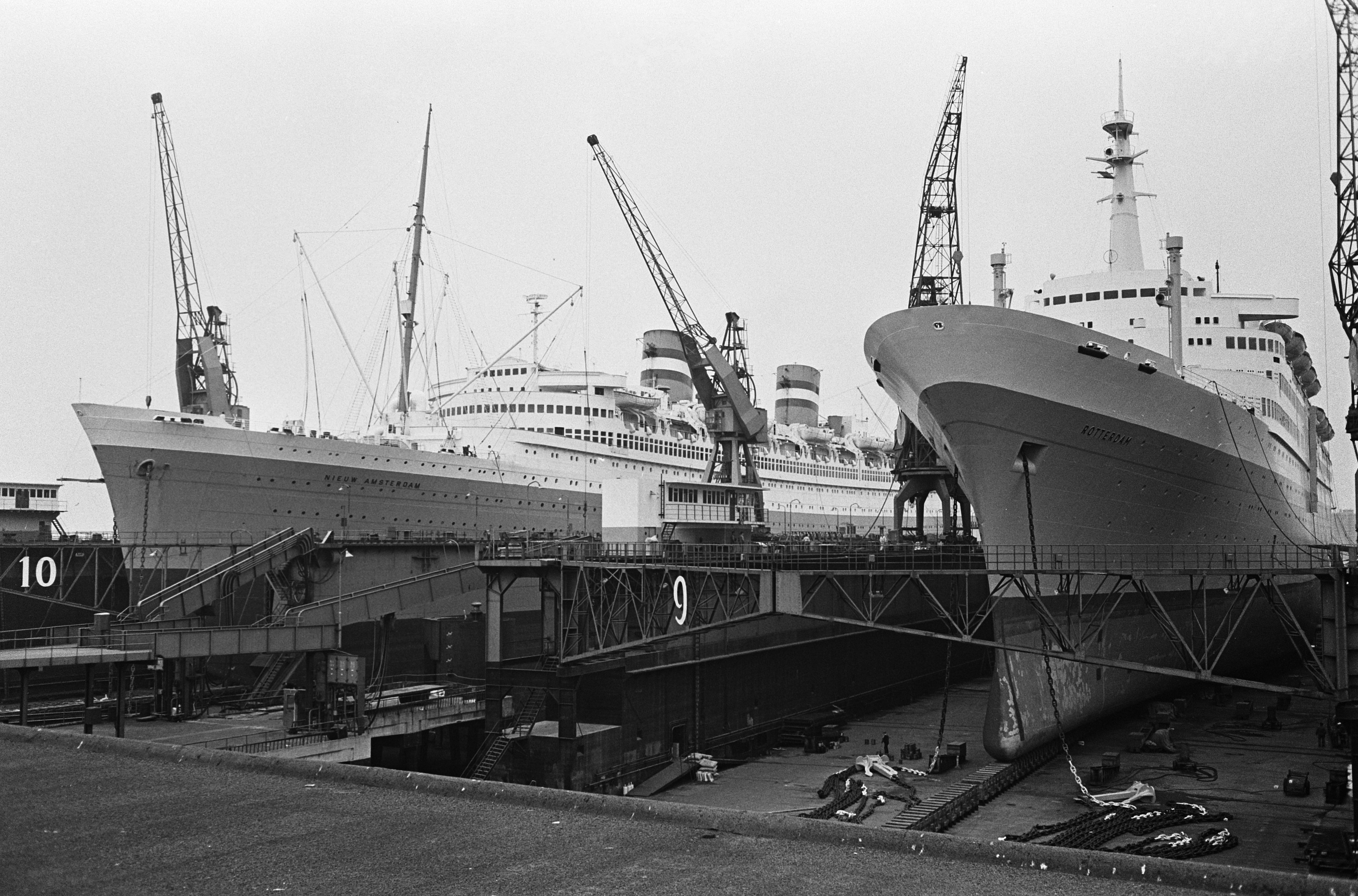 Collectie / Archief : Fotocollectie Anefo Reportage / Serie : [ onbekend ] Beschrijving : De twee passagierschepen van HAL, de "Rotterdam" (rechts) "Nieuw Amsterdam" in dok Datum : 21 november 1963 Locatie : Rotterdam, Zuid-Holland Fotograaf : Koch, Eric / Anefo Auteursrechthebbende : Nationaal Archief Materiaalsoort : Negatief (zwart/wit) Nummer archiefinventaris : bekijk toegang 2.24.01.05 Bestanddeelnummer : 915-7624